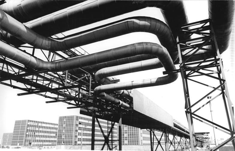 ADN-ZB-Lehmann-21.5.81-eng-Wettbewerb-Bez. Halle: Gigantische Rohrbrücken, die Energie vom Kraftwerk zum Chlorbetrieb bringen, bestimmen die Industrielandschaft im Chemiekombinat Bitterfeld. Mit einem starken Leistungsanstieg, basierend auf einer hohen Veredelungsstufe einheimischer Rohstoffe, sichern die Chemiearbeiter aller Chlorbetriebe des CKB ihr Wettbewerbsziel, bis Jahresende drei zusätzliche Tagesproduktionen abzurechnen.